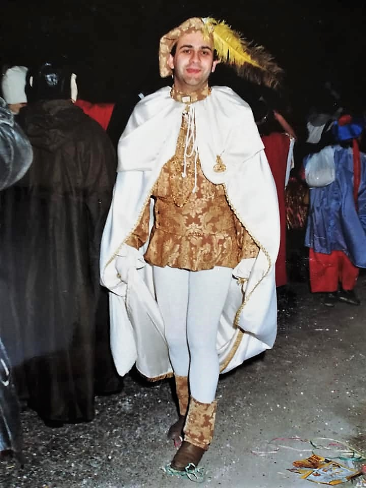 Carnevale 1991.